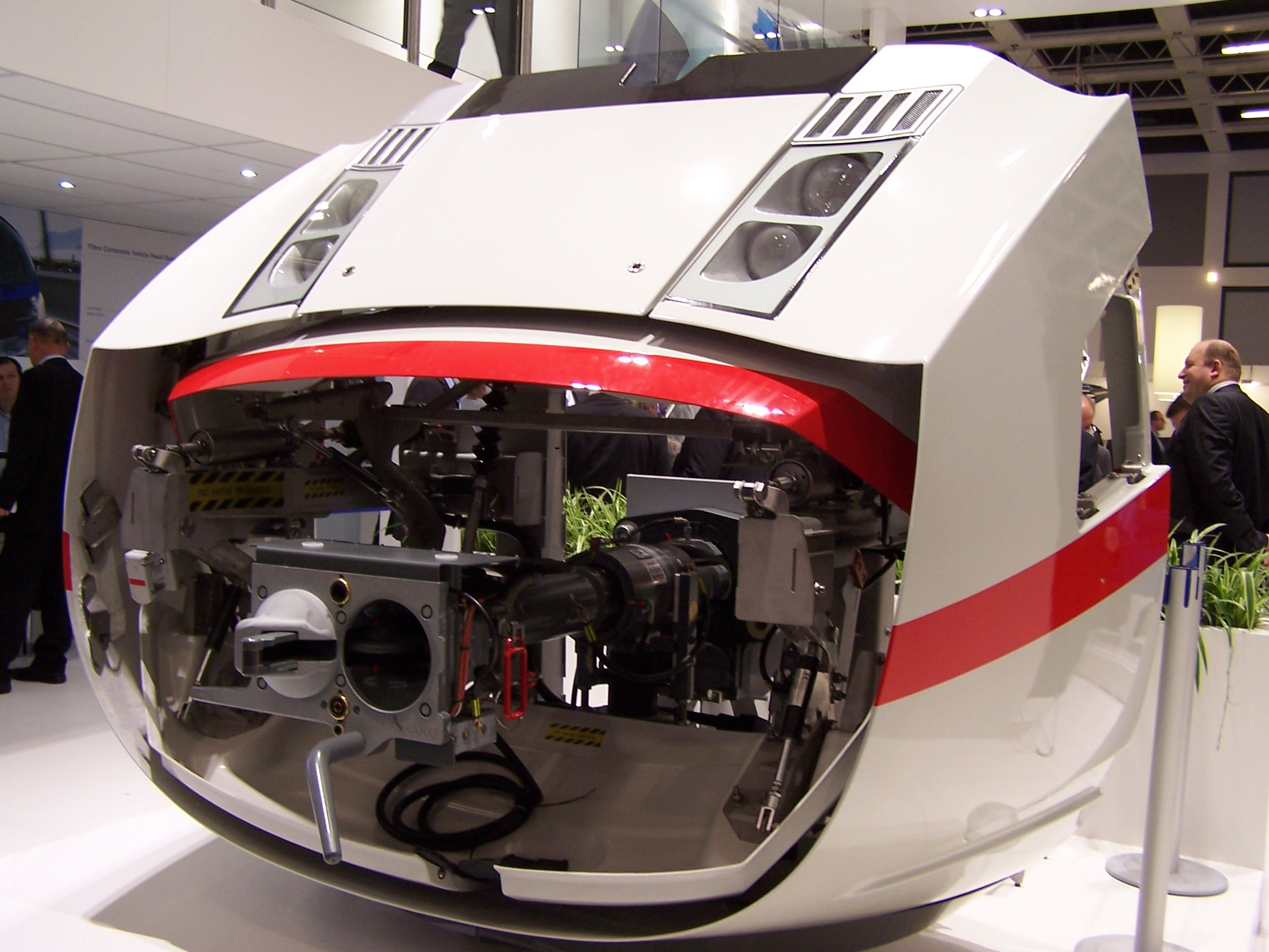 Offene Bugklappe des ICx von Siemens auf der InnoTrans 2014, in Berlin.